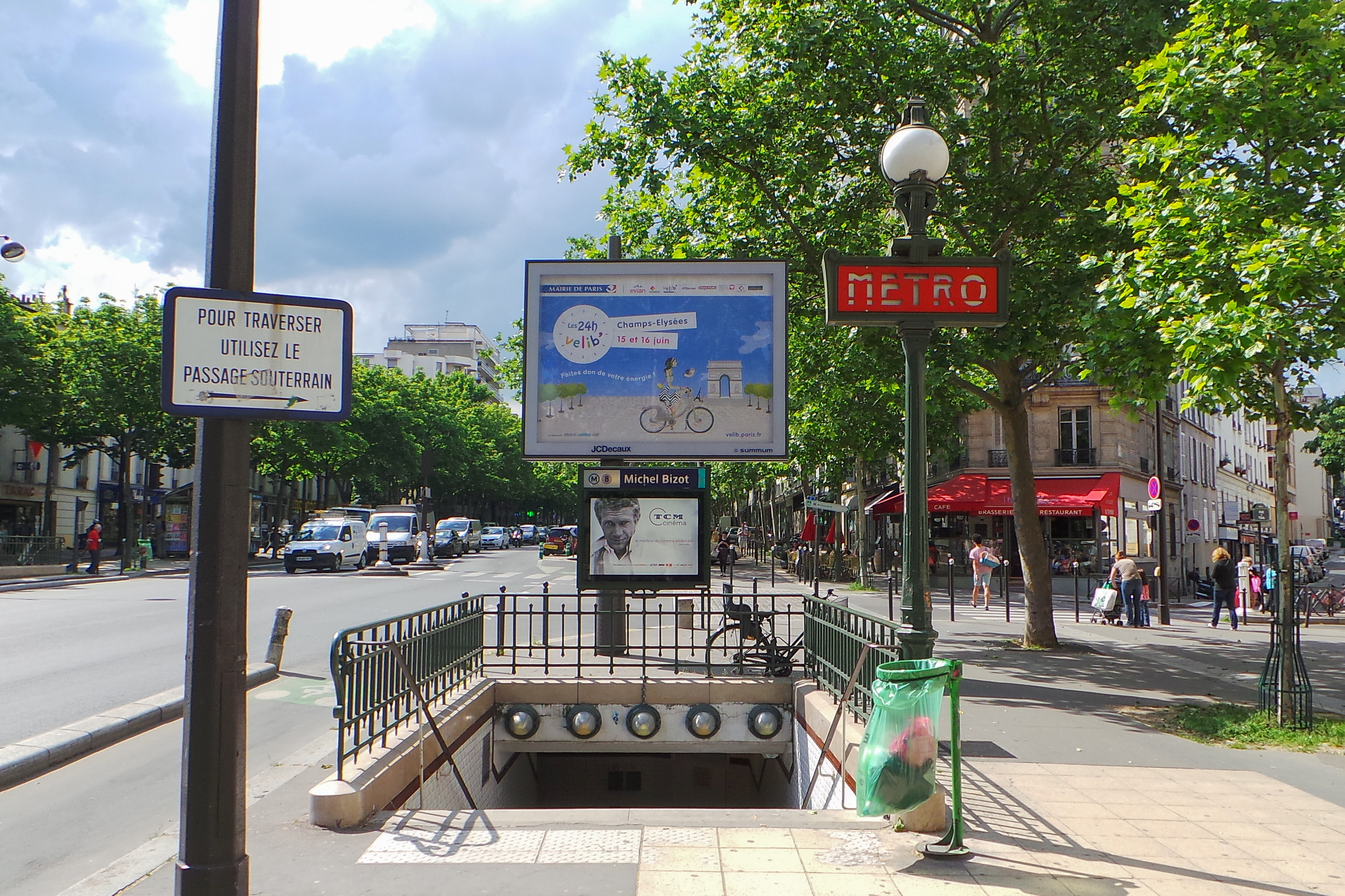 Station de métro Michel Bizot, ligne 8 du métro de Paris - Paris, France